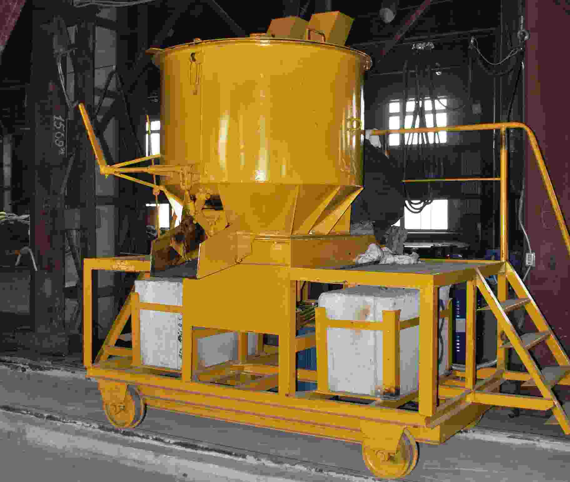 Смеситель компонентов с механической мешалкой и электроприводом. Объем смесителя 0,9 м.куб.